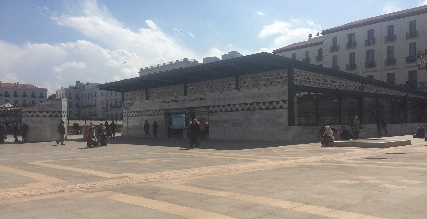 Accès principal de la station Place des Martyrs du métro d'Alger